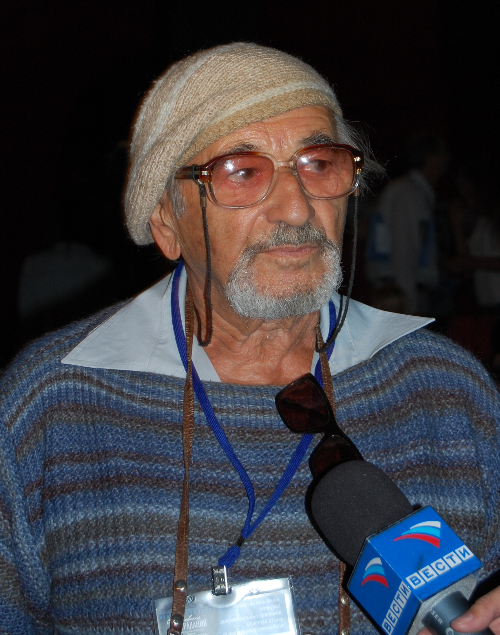 Герц Франк на фестивале документального кино "Саратовские страдания", председатель жюри, 16 сентября 2010 года.